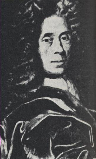 Bildnis Weipert Ludwig von Fabrice (1640–1724)